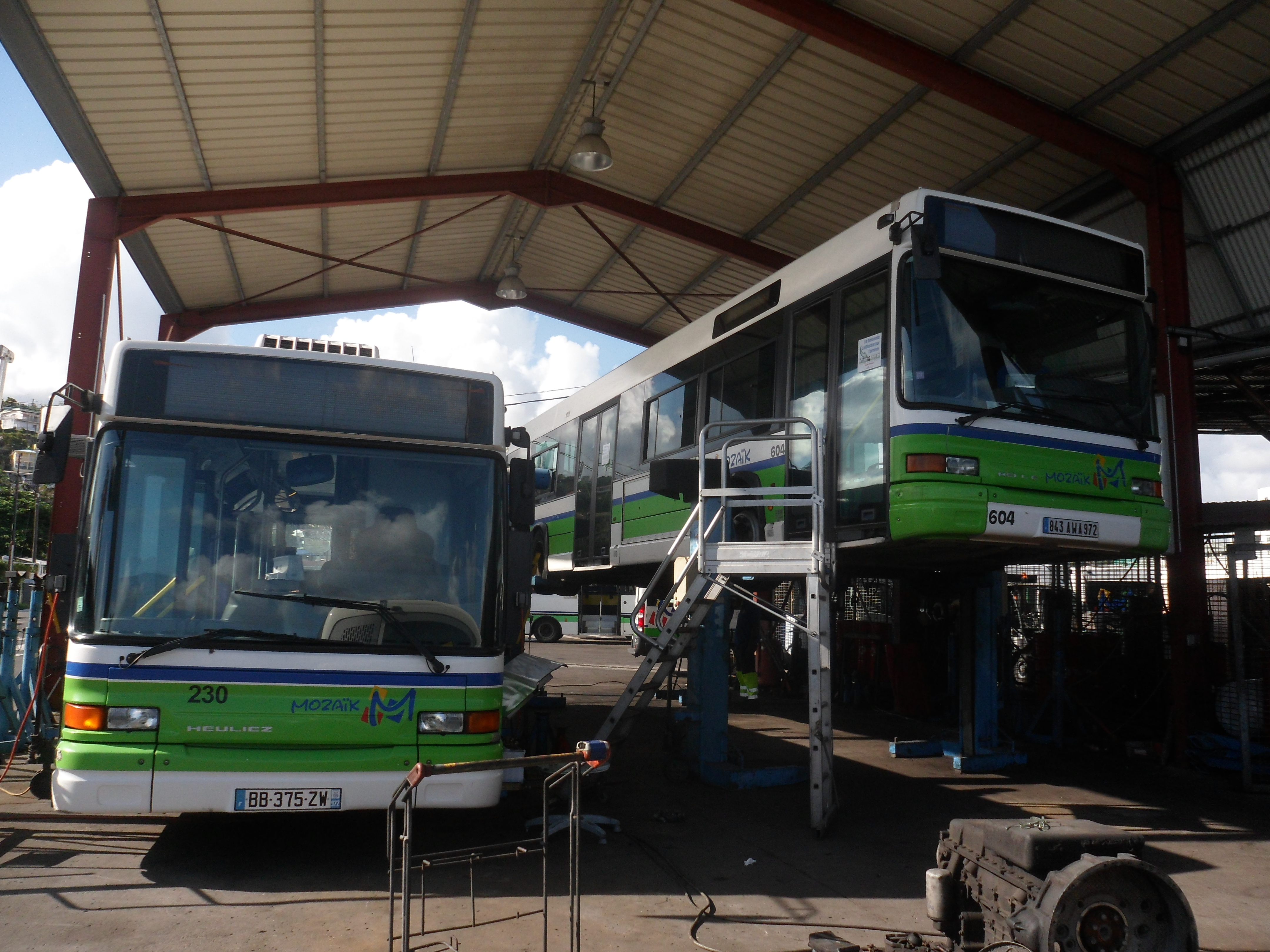 Vue sur l'atelier de maintenance du dépôt de Mozaïk, à Fort-de-France en Martinique.